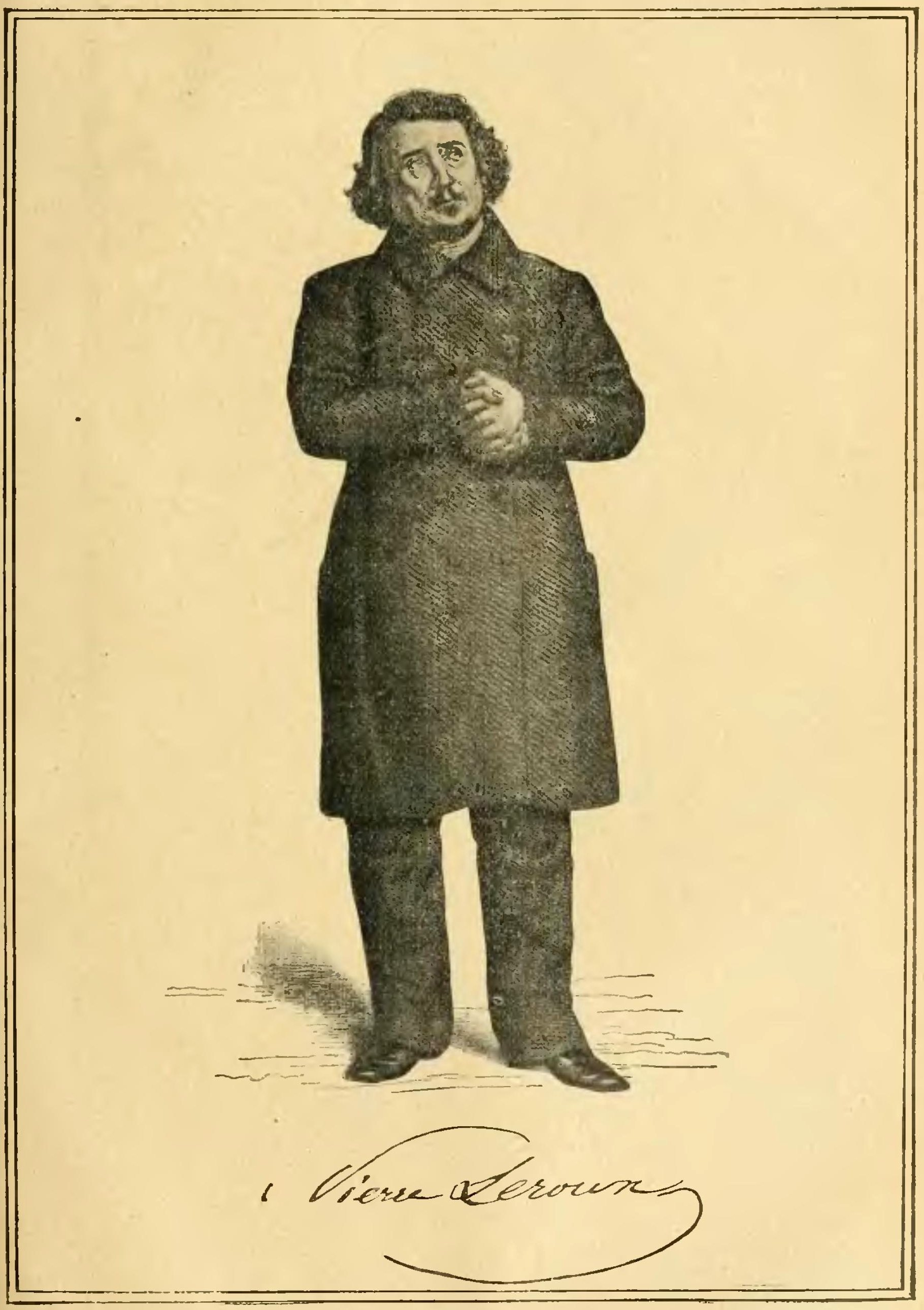 Histoire socialiste sous la direction de Jean Jaurès 1908, Volume 8, Le règne de Louis-Philippe, illustration page 485